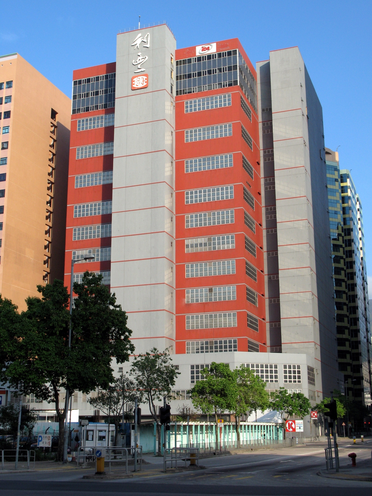 利豐大廈 HK Li Fung Centre